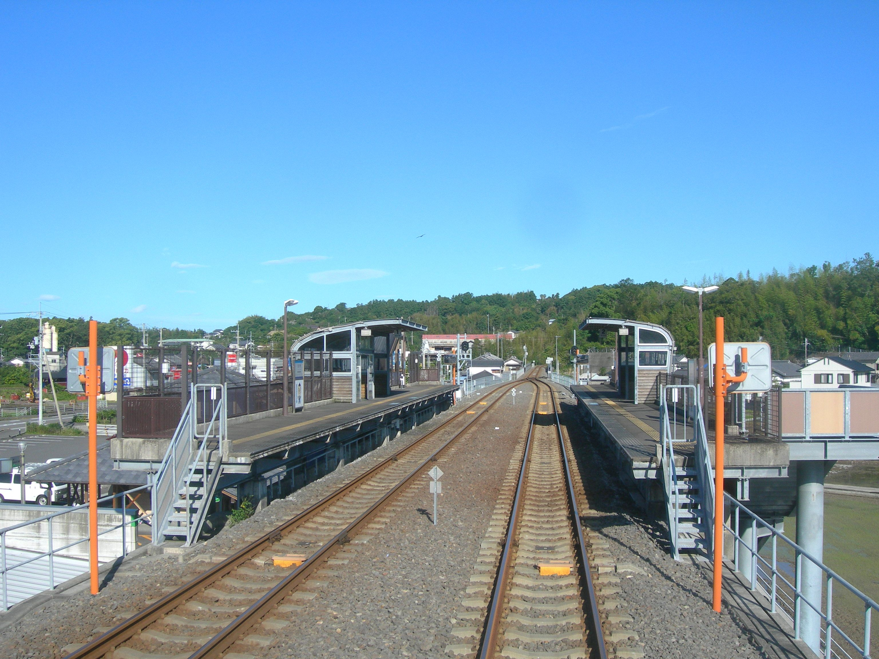 田野駅ホーム